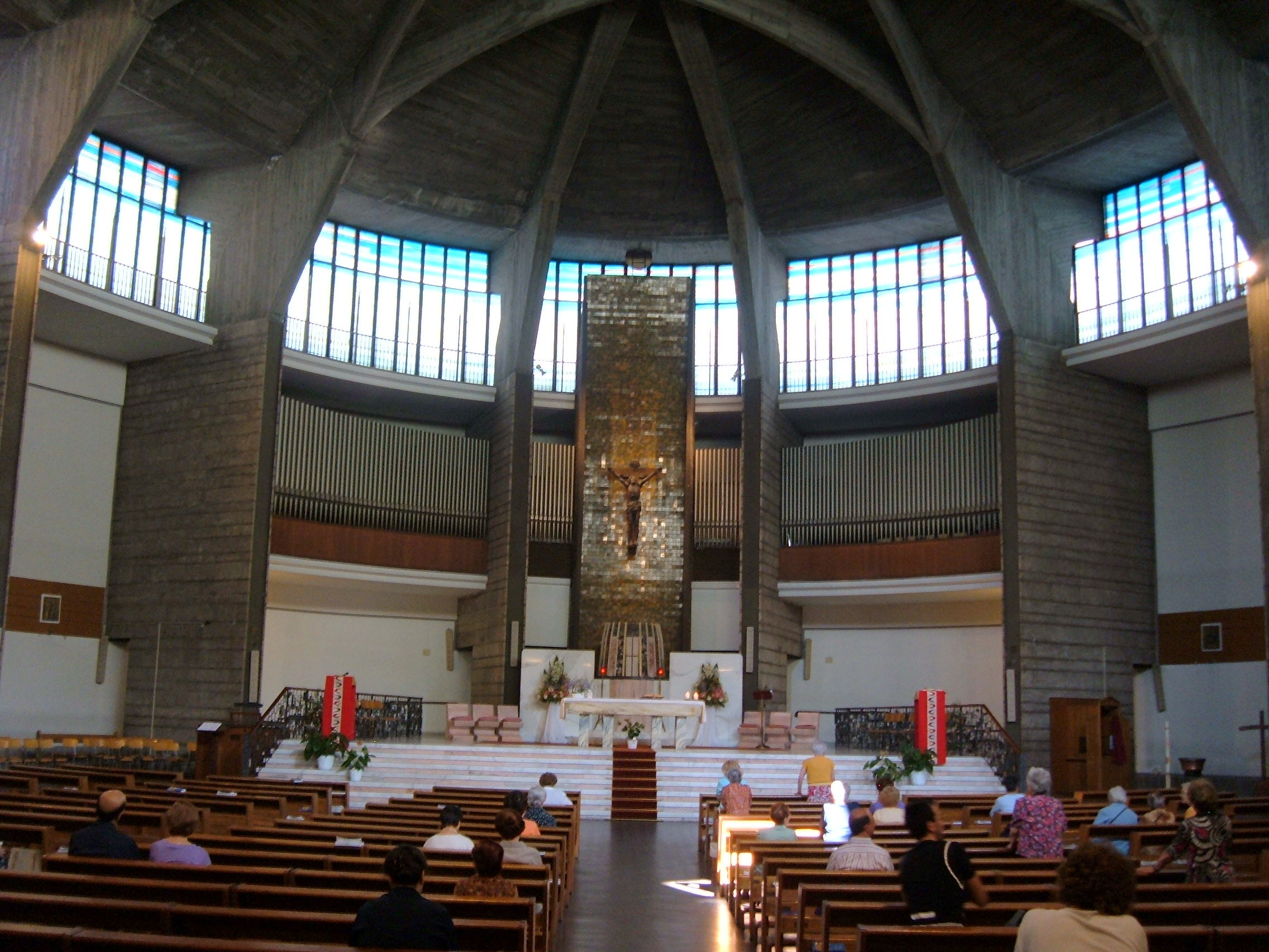 Chiesa di Gesù Divino Lavoratore, a Roma, nel quartiere Portuense.